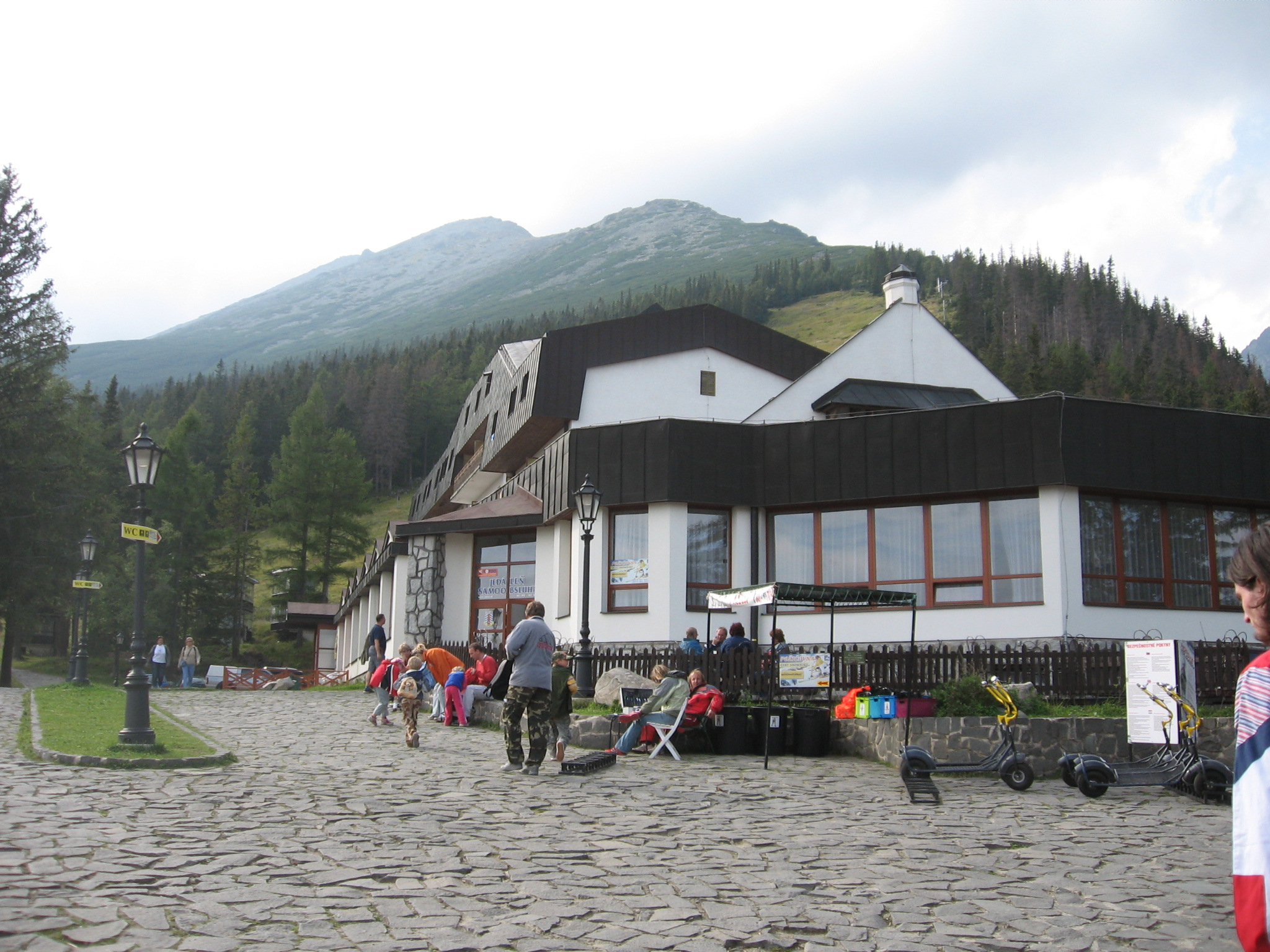 horský hotel Hrebienok